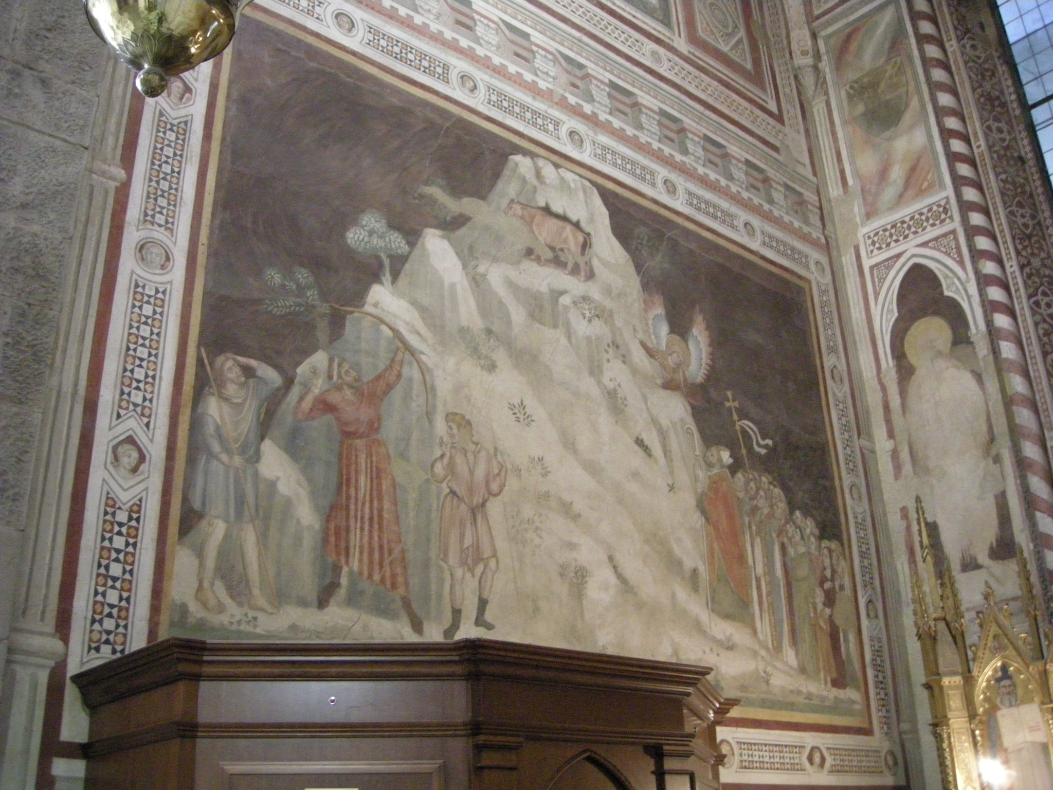 Cappella velluti, affreschi maestro anonimo